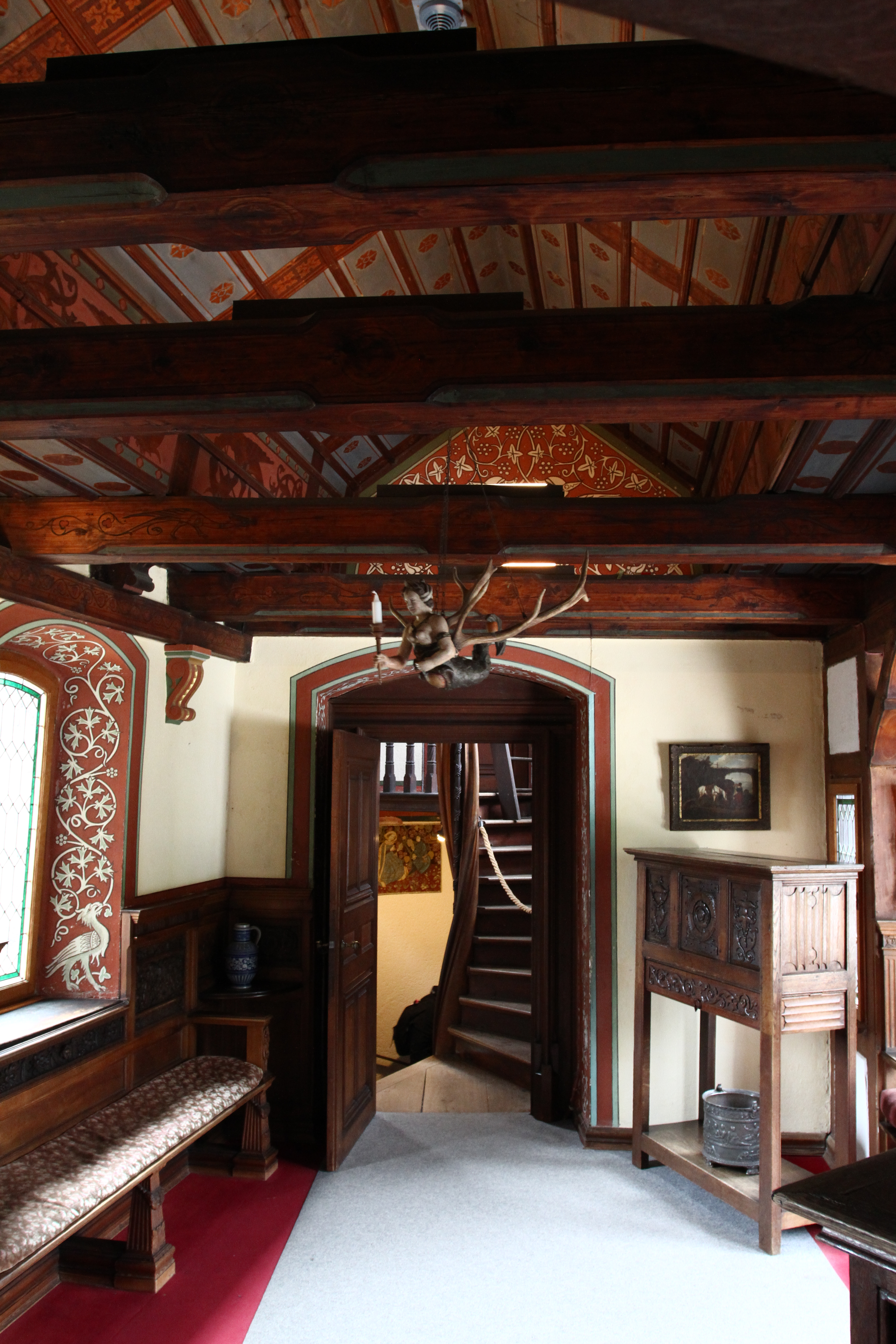 Переход над крепостными воротами, замок Райхсбург